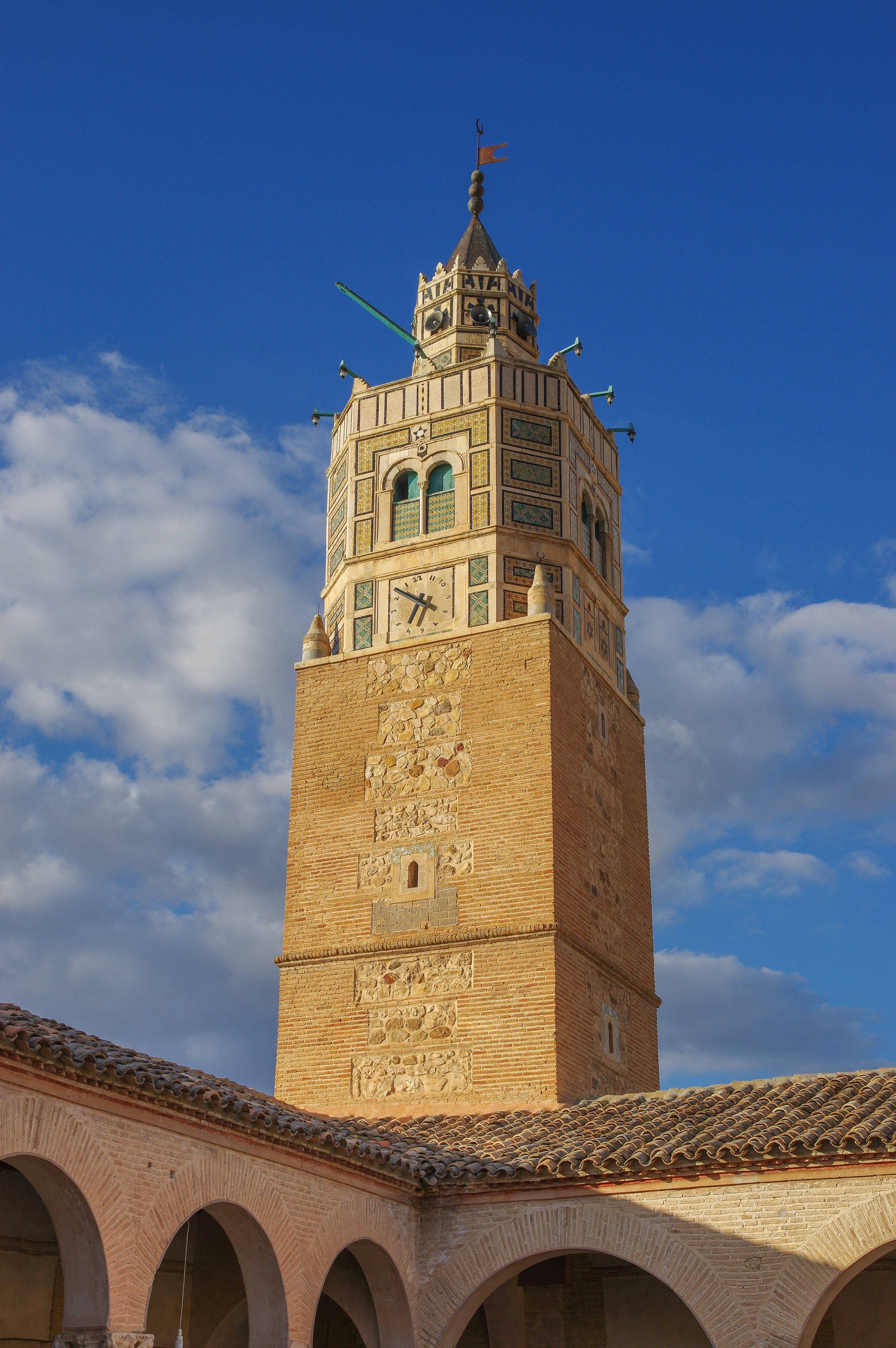 Grande mosquée